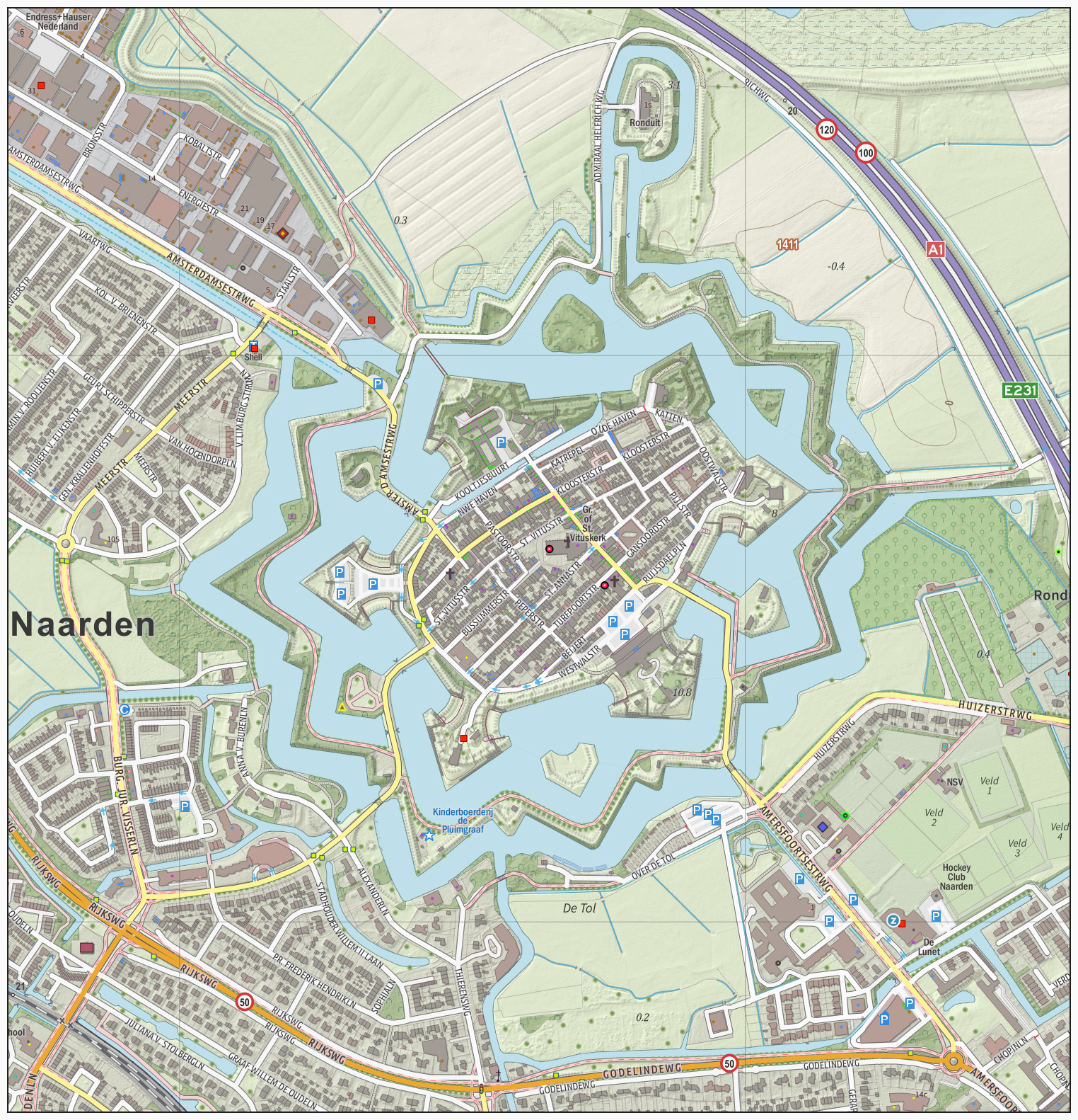 Topografische kaart van Naarden (vesting). Resolutie: 800 pixels/km. Kaartbeeld samengesteld uit de open geodata van de Top10NL en Top25namen (Basisregistratie Topografie, Kadaster), Creative Commons BY licentie. Gebouwvlakken uit open geodata BAG extract. Wegen uit de OpenStreetMap. Reliëfschaduw uit de Actuele Hoogtekaart AHN2. Samenstelling en kleurenschema: Jan-Willem van Aalst, met QGIS2. Zie ook de Legenda.